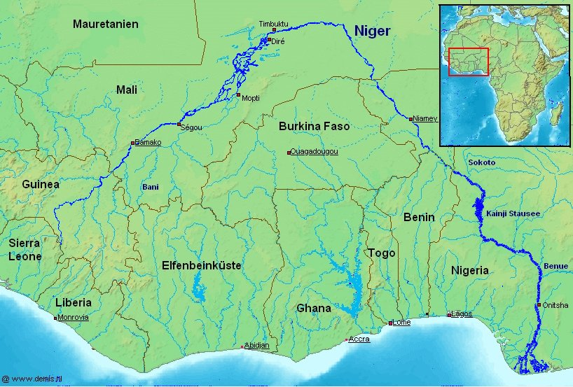 Karte, Niger Fluss Zeichner: Kiko2000 unter Verwendung einer gemeinfreien Karte Erstellt: 25.10.2004 Lizenzstatus: GNU FDL